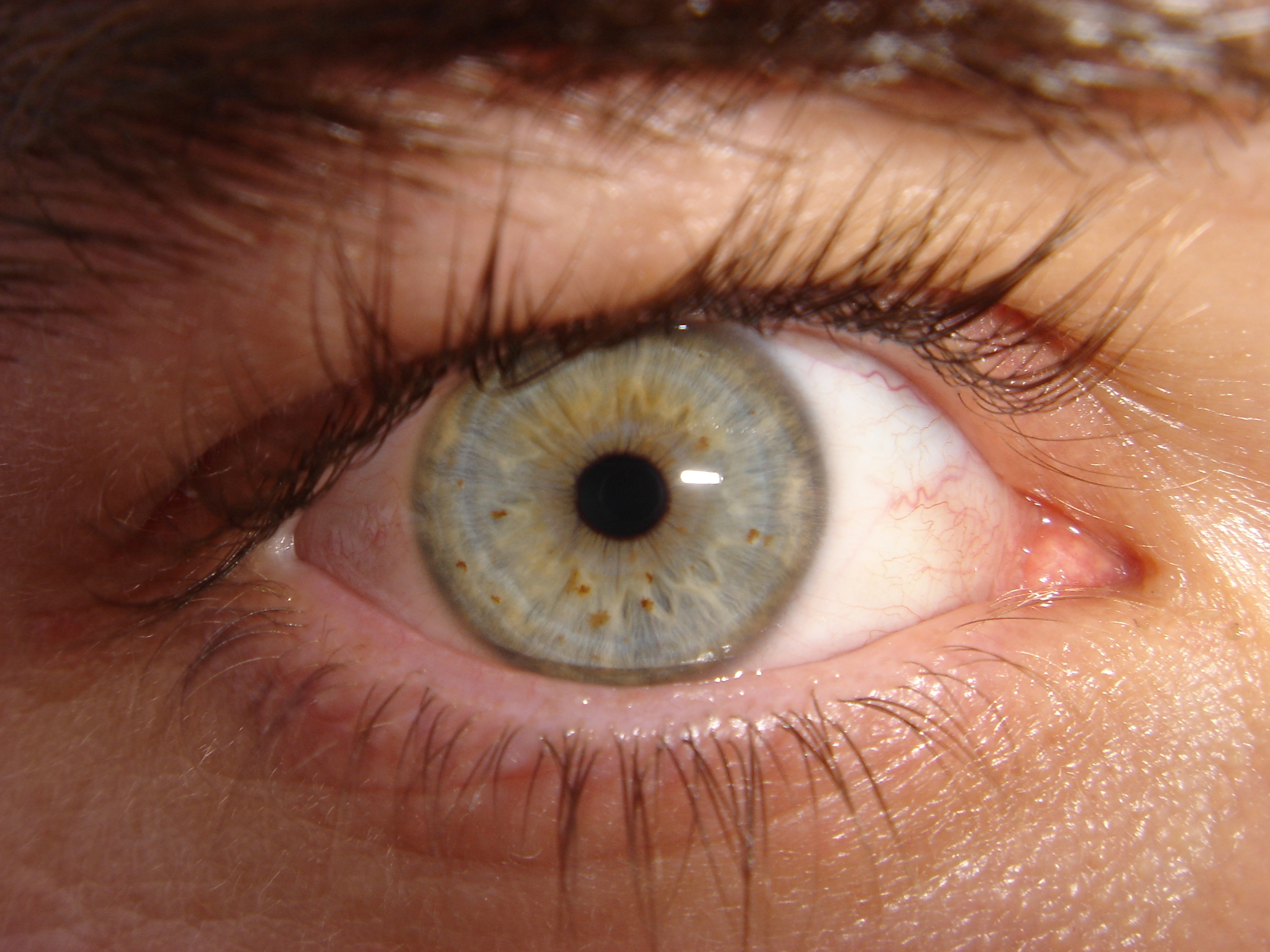 an eye